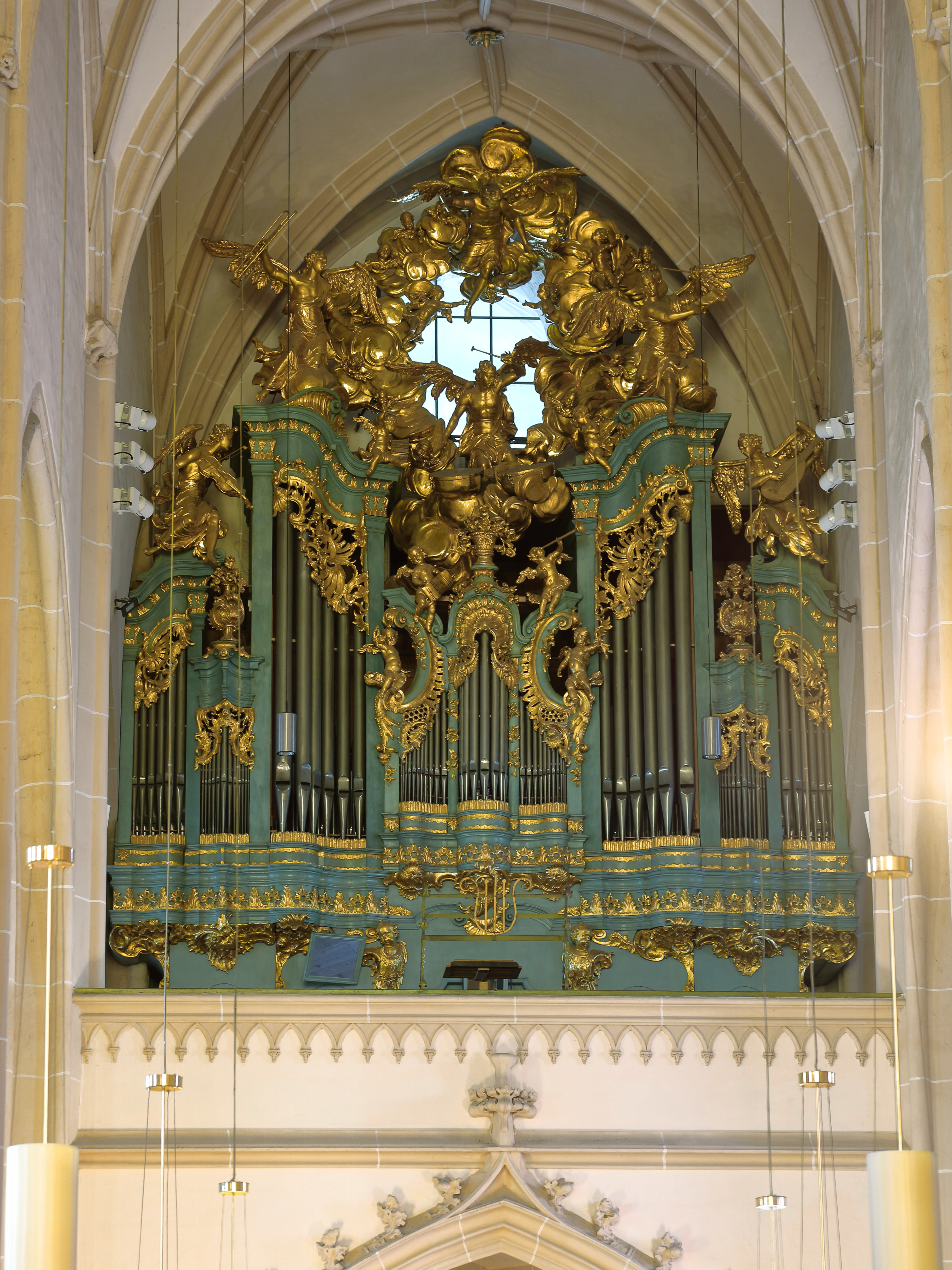 Orgel der Stadtpfarrkirche St. Stephan in der niederösterreichischen Stadtgemeinde Baden.Die Orgel fertigte ursprünglich der Orgelbauer Johann Hencke 1744 für die Kirche des Chorherrenstiftes St. Dorothea in Wien. Nach der Klosterauflösung 1786 wurde die Orgel 1787 nach Baden übertragen. Das prachtvolle Schnitzwerk mit seinen Engelsstatuen stammt vom Wiener Bildhauer Ignaz Gunst. 1987 wurde in das bestehende Gehäuse von der Orgelbaufirma Gerhard Hradetzky eine neue Orgel eingebaut. Die Orgel verfügt über 28 Register, verteilt auf zwei Manuale und Pedal. Von der ursprünglichen Hencke-Orgel ist noch der Prospekt mit den Prinzipalpfeifen und ein Manual erhalten.